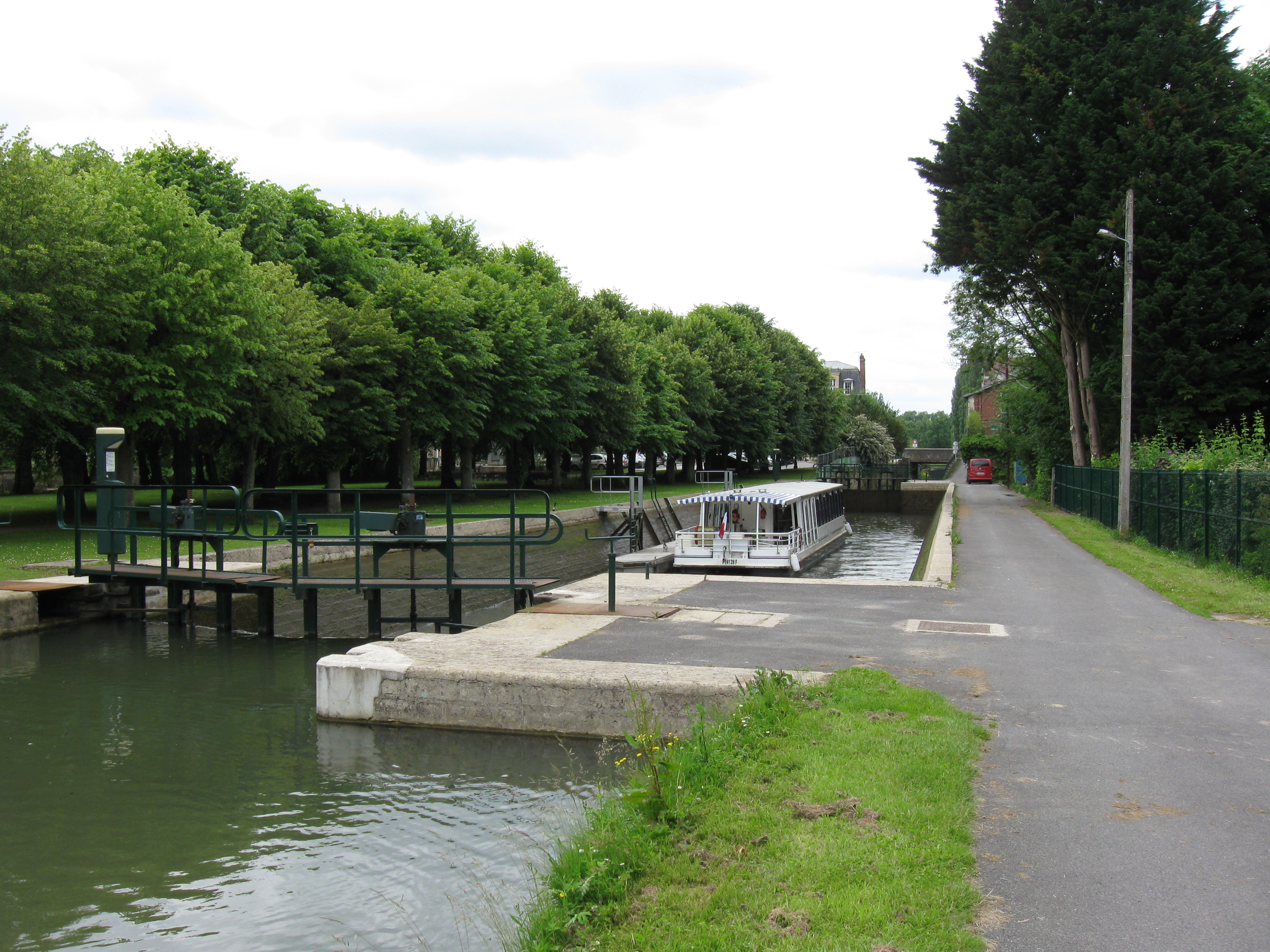 Écluse sur l'Ourcq à La Ferté-Milon. (Aisne, région Picardie).